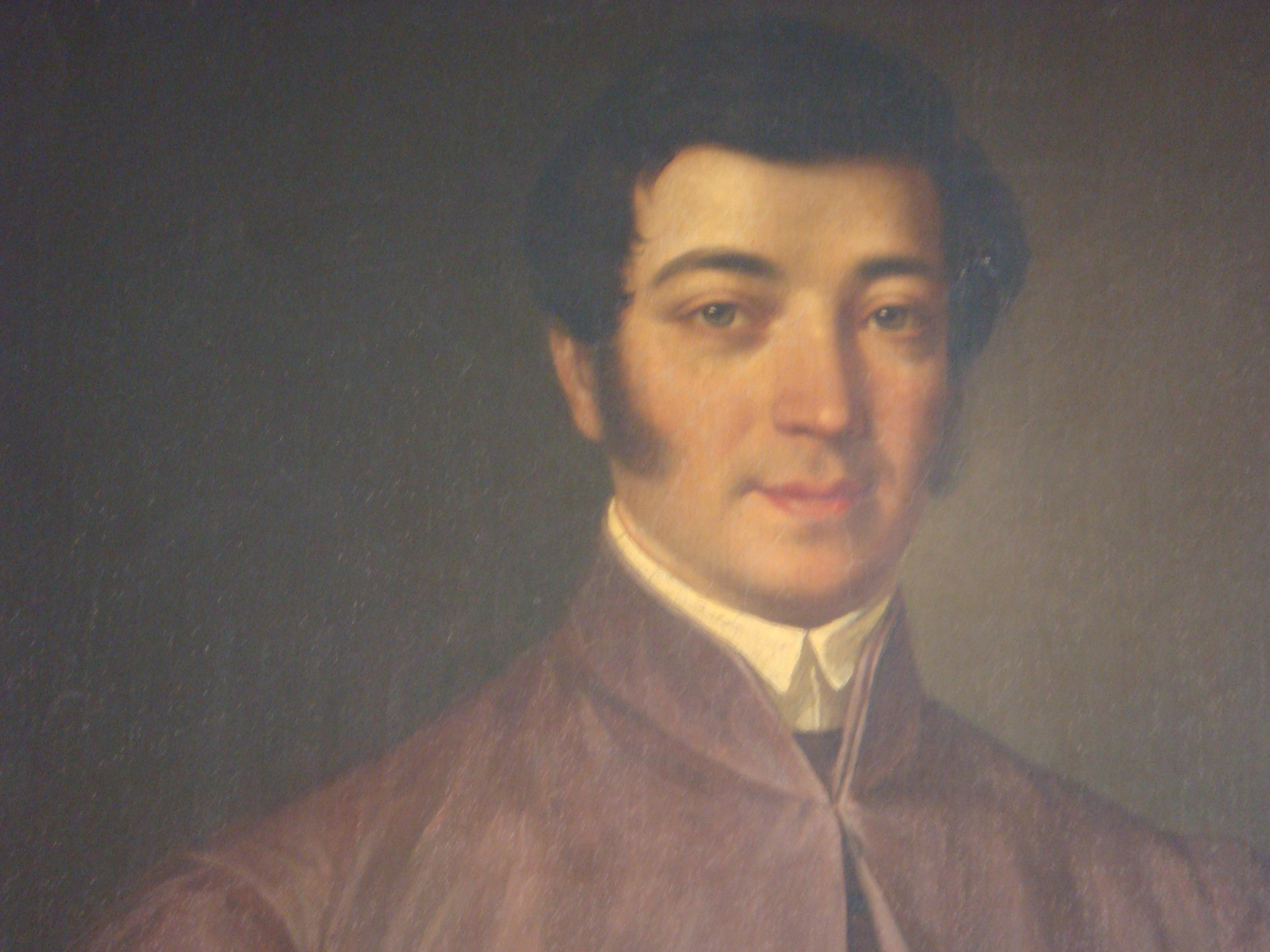 Gaetano Moroni, primo aiutante di Camera di Gregorio XVI (Particolare dell'olio su tela 73*89 cm.) VIETATO L'USO IMPROPRIO DEL RITRATTO